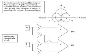 Disposicion y explicacion grafica Tecnica M&S